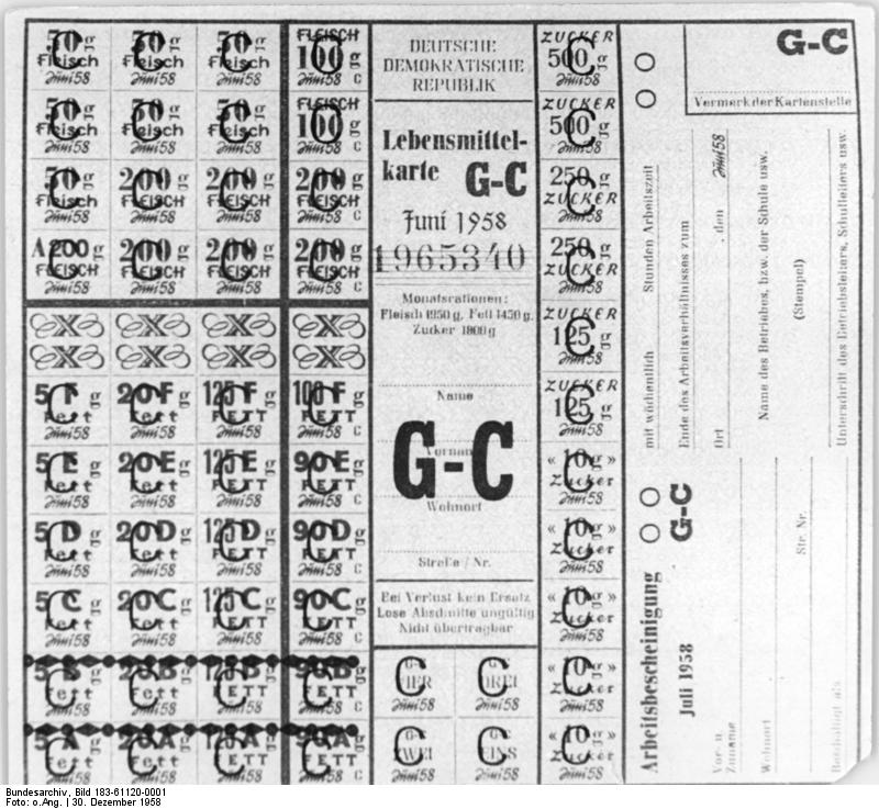 DDR-Lebensmittelkarte Zentralbild Repr. Vo-L 30.12.1958 Lebensmittelkarte (DDR) aus dem Jahre 1958.